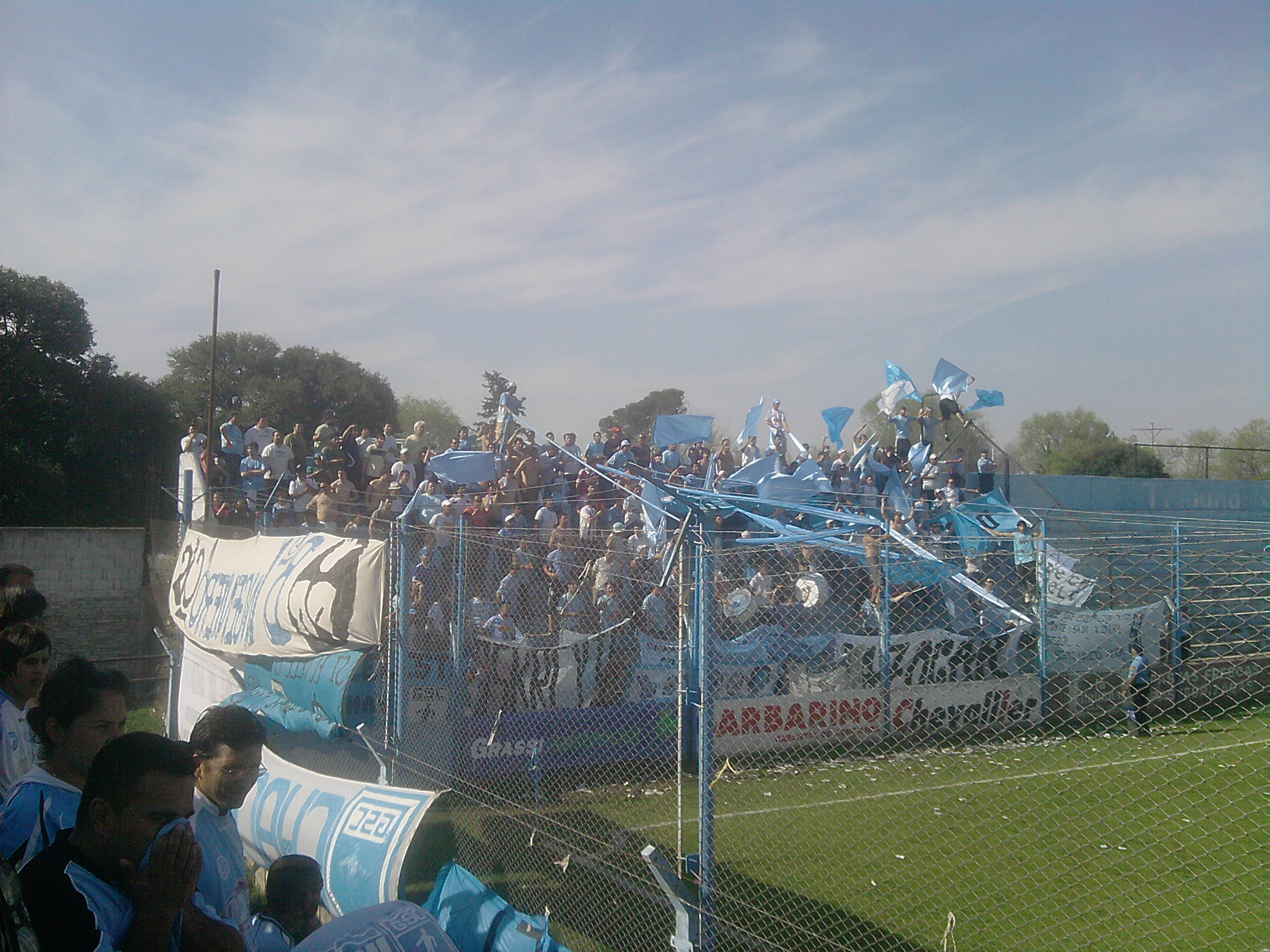 El celeste debuta en Córdoba por el torneo argentino B 2012